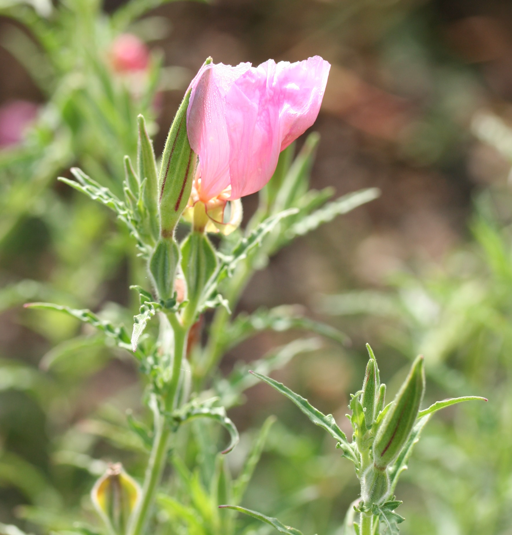 Oenothera tetraptera im Botanischen Garten Dresden